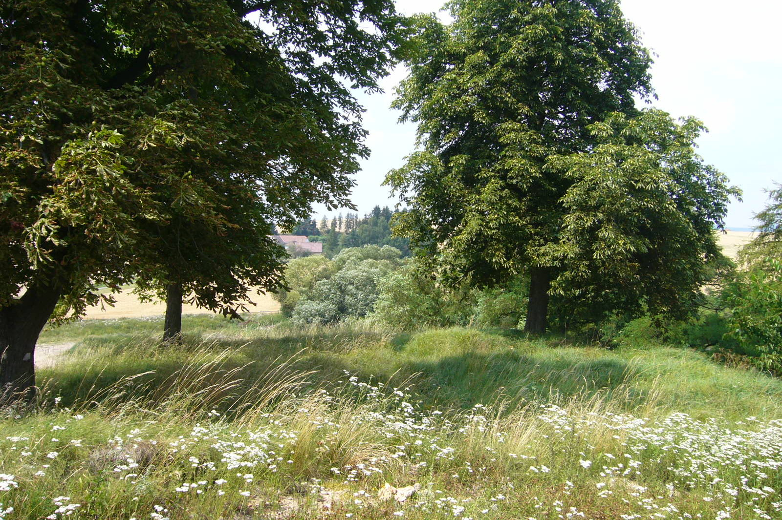 Tvrziště Hrádek, Slepičí hora, plocha jádra tvrze